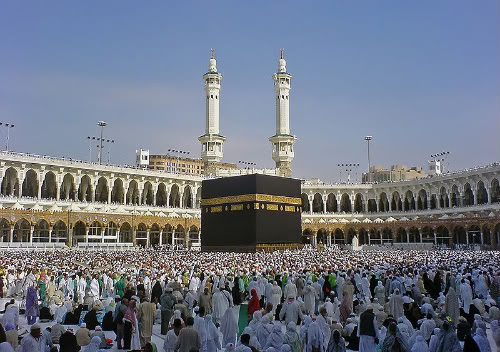 Kaaba í Mekka